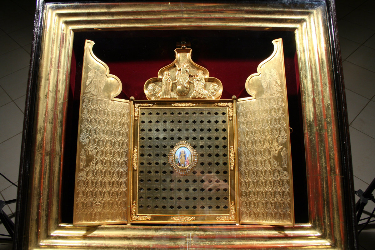 Складень-мощевик содержащий 132 частицы мощей святых